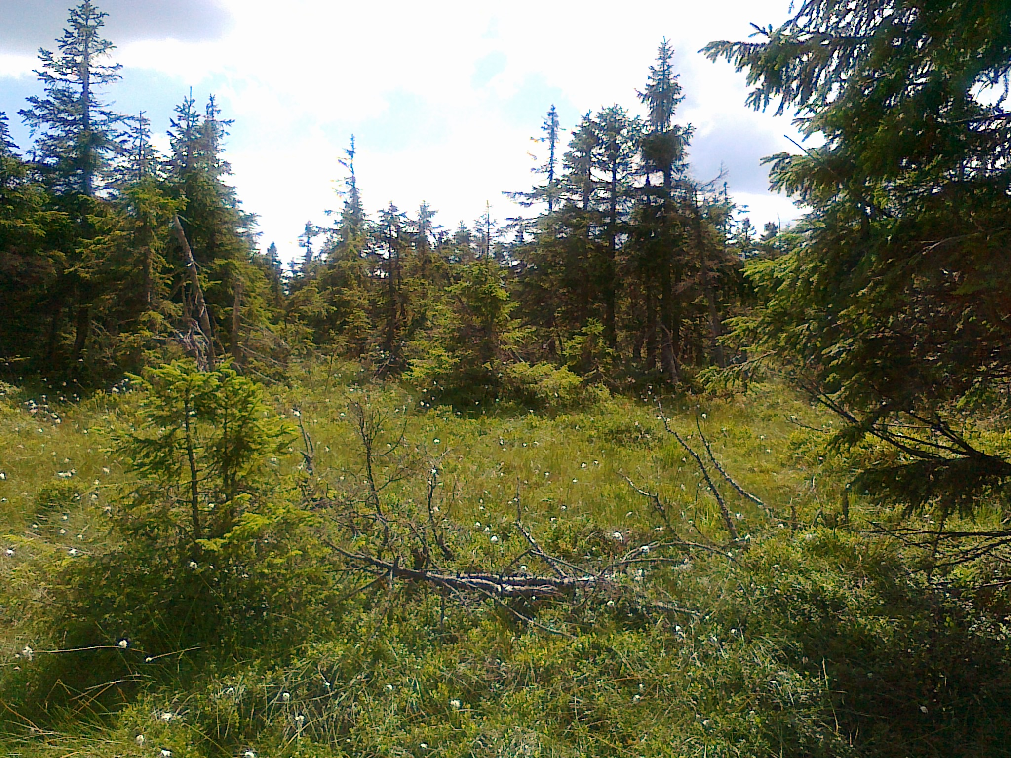 Szczyt Velký Děd - 1408 m n.p.m.